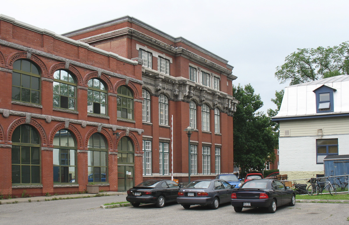 Centre Alyne-Lebel , boulevard Langelier, Ville de Québec (Québec) Canada. À côté du Parc du Moulin-de-l'Hôpital et du Moulin à vent de l'Hôpital-Général-de-Québec. Ancienne école technique de Québec construite en 1909 et conçue par l’architecte René Pamphile Lemay. Cet édifice en brique, rebaptisé « Centre Alyne-Lebel », abrite maintenant des organismes culturels et communautaires.